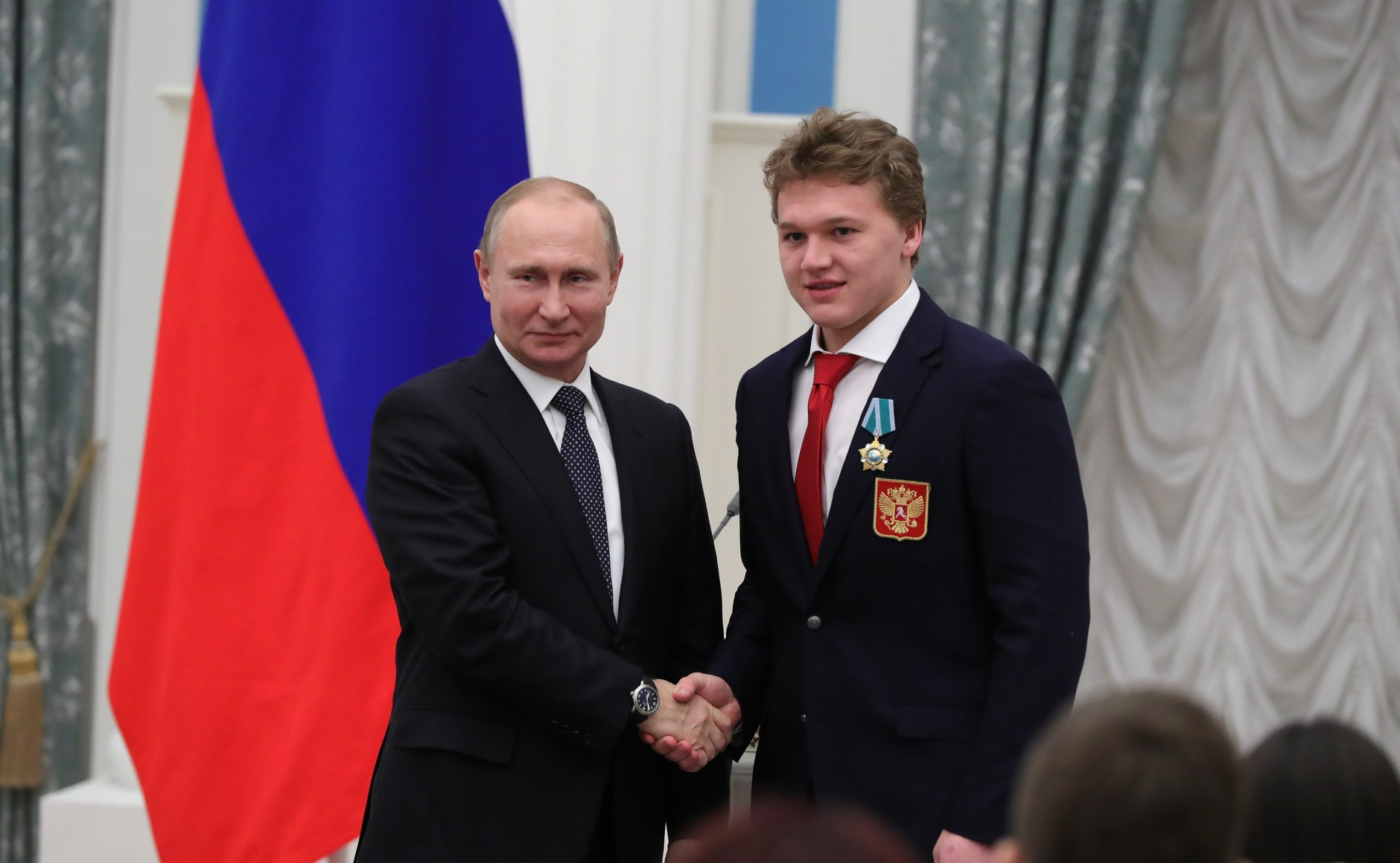 С олимпийским чемпионом по хоккею Кириллом Капризовым